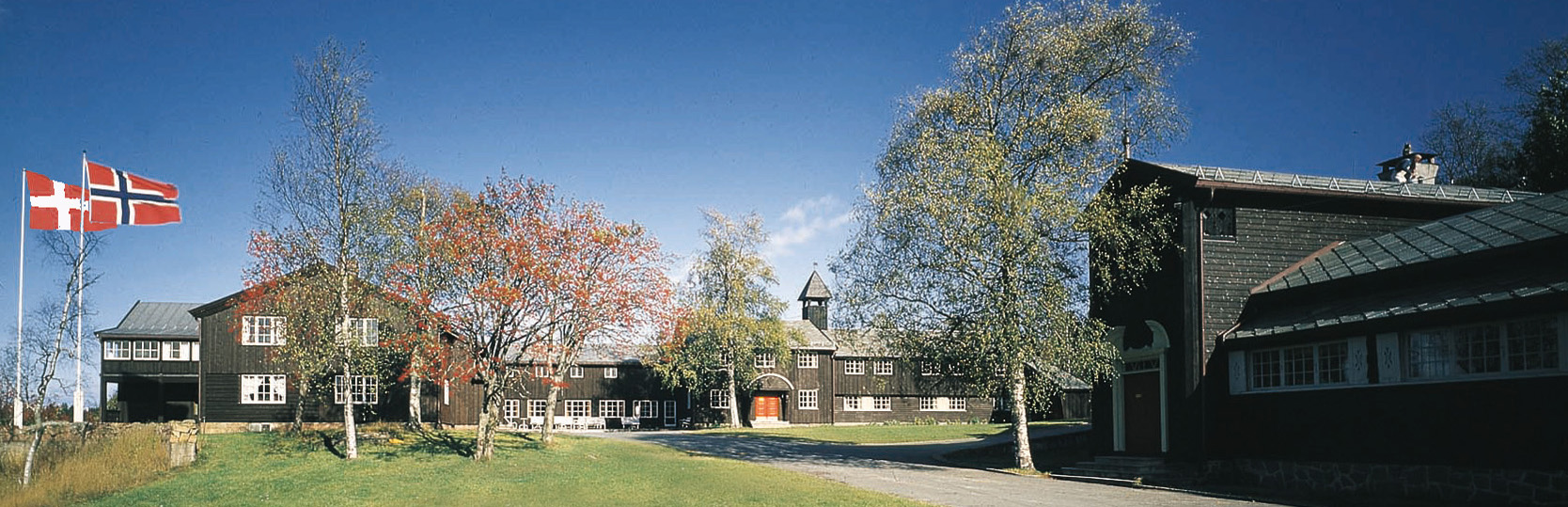 Lysebu tunet haust